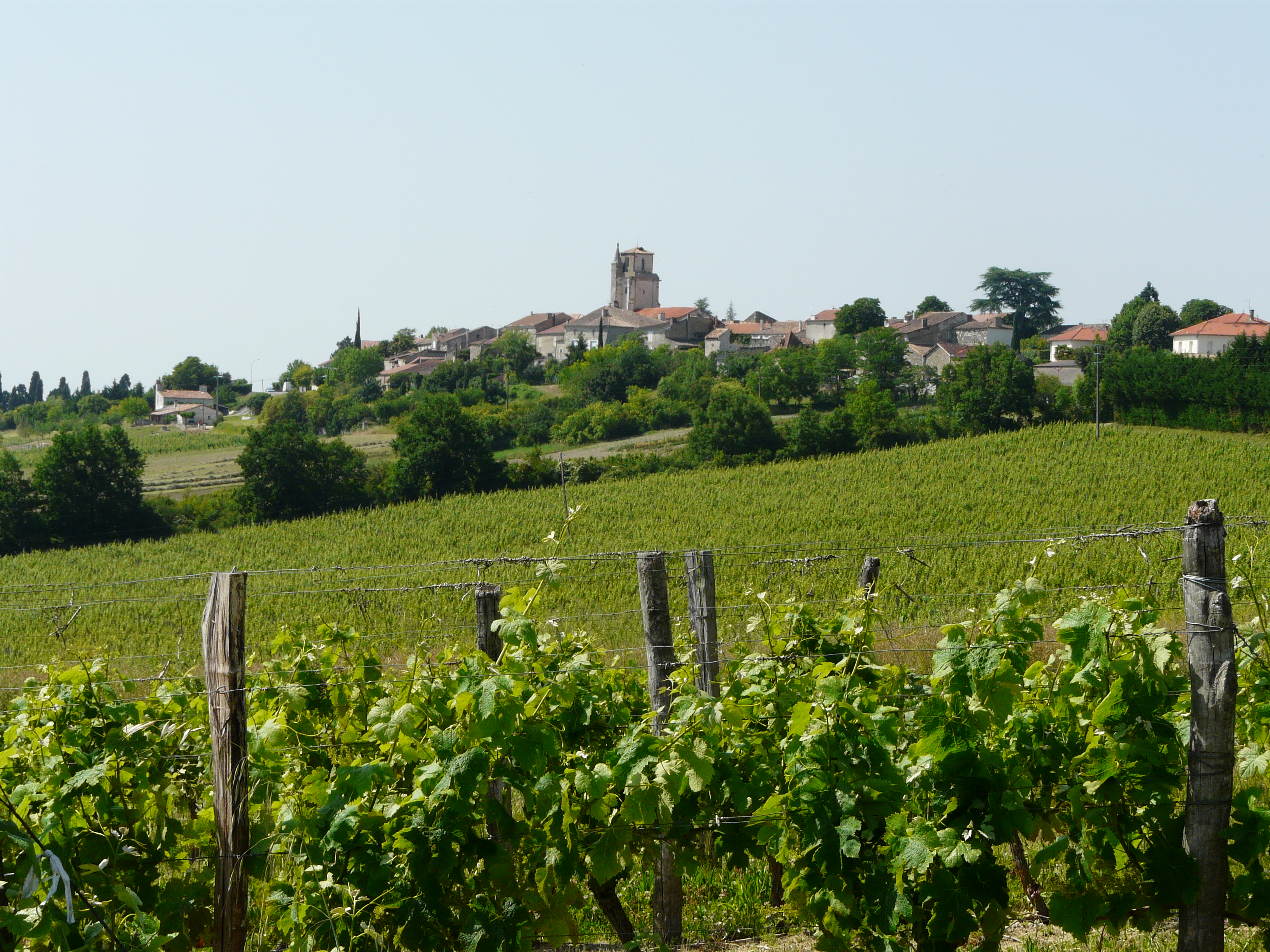 Le village de de Montagnac-sur-Auvignon, Lot-et-Garonne, France.